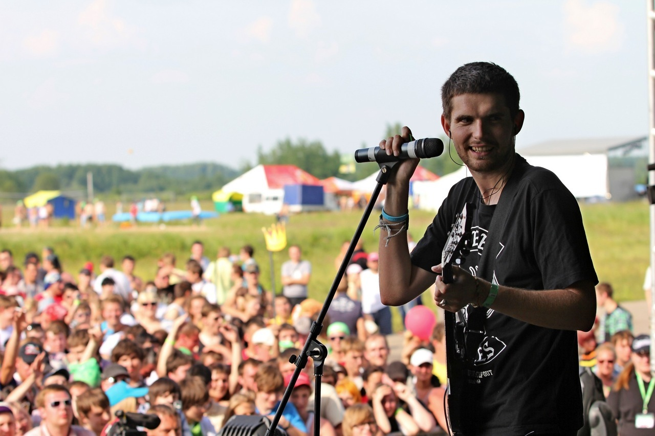 Noize MC на Доброфест 2011